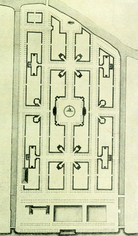 Проект ділянки 2-го Літнього саду: ландшафтний дизайн